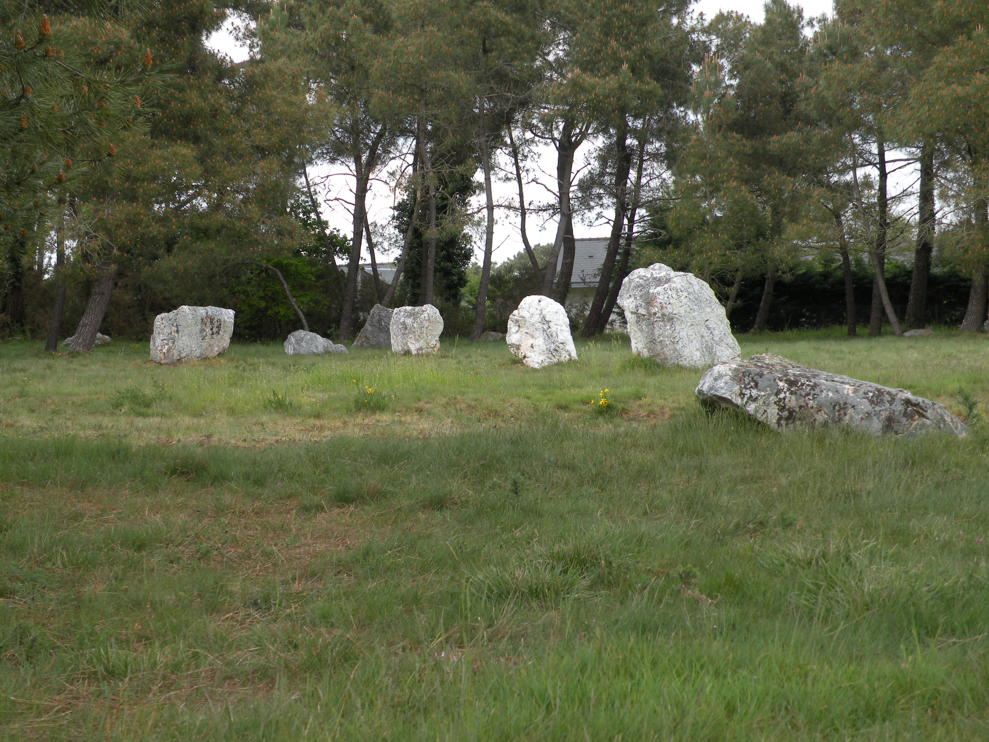 Alignement de menhirs des Demoiselles à Langon.